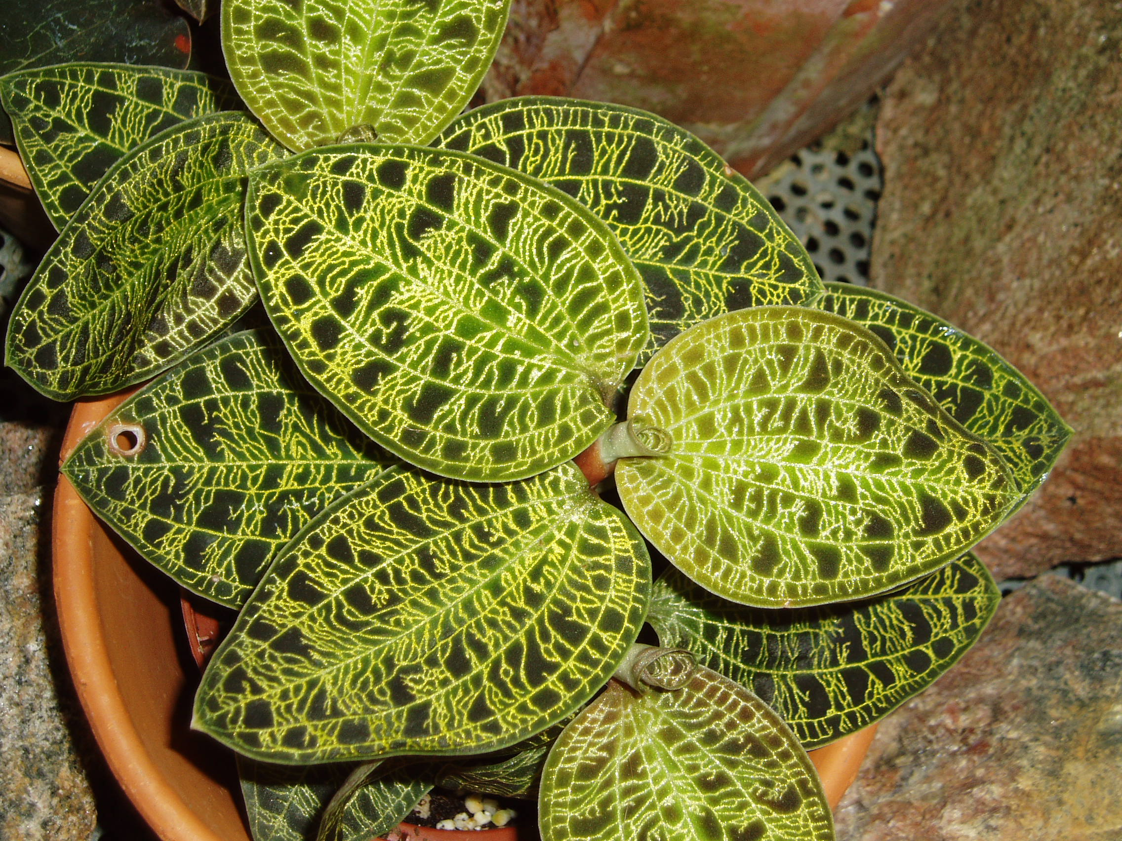 Macodes petola, Gothenburg Botanical Garden